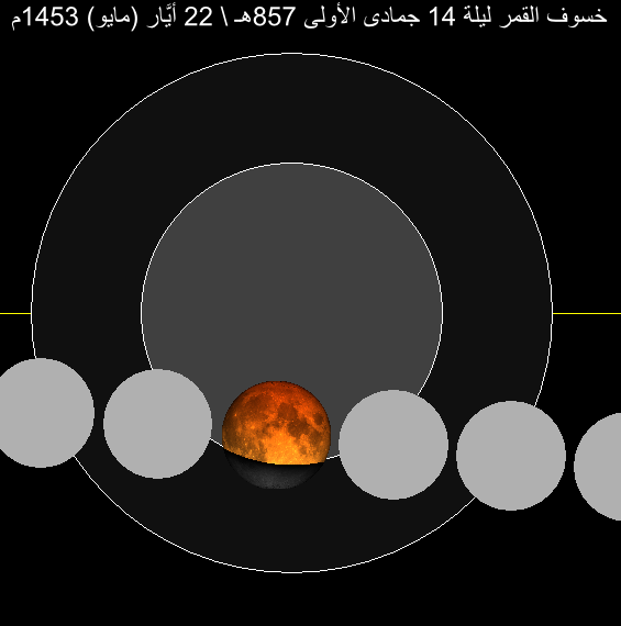 الخُسوف القمري الذي وقع ليلة 14 جمادى الأولى سنة 857هـ المُوافقة ليوم 22 أيَّار (مايو) 1453م. رسمٌ بيانيّ يُظهرُ عبور القمر في ظل الأرض.